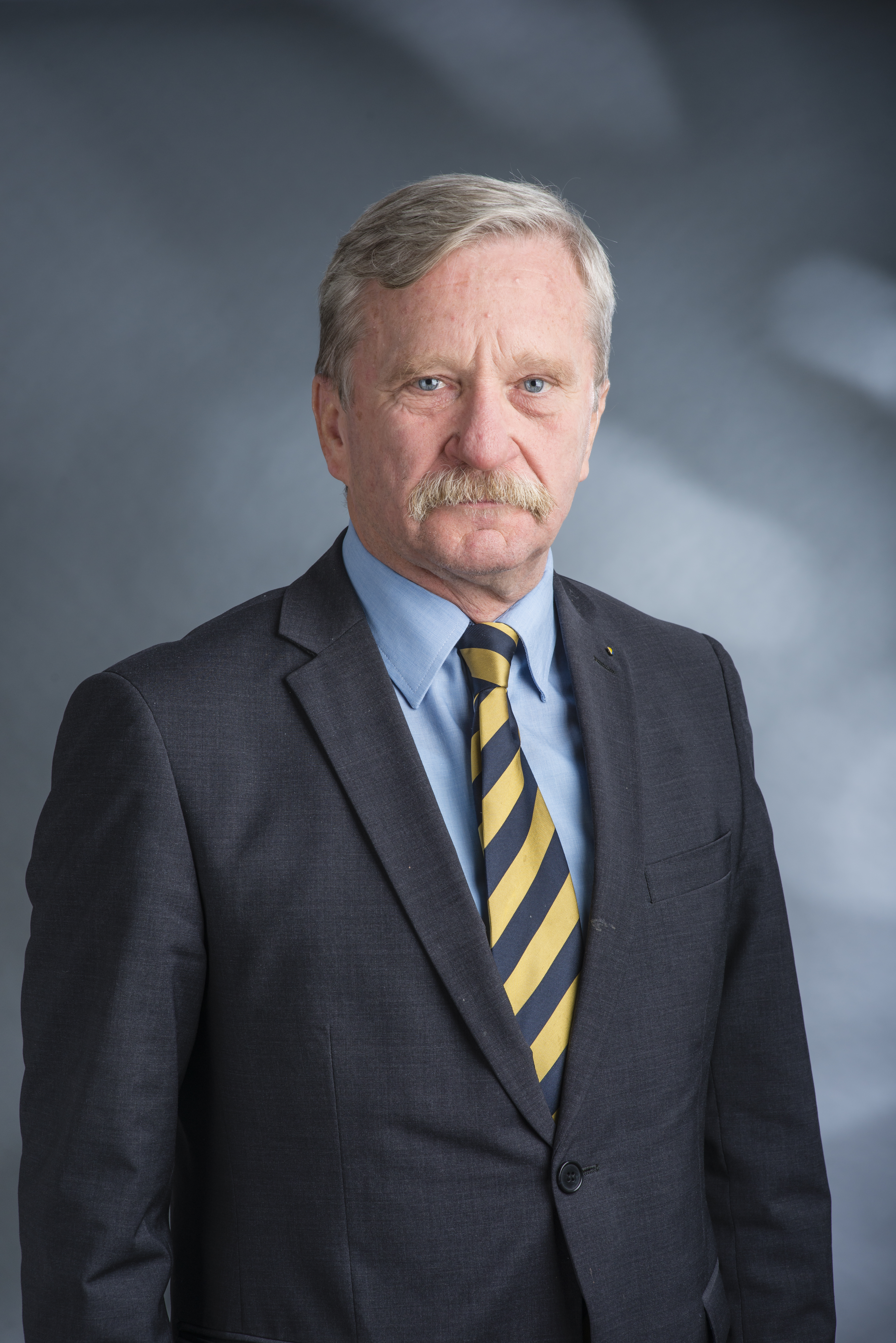 Peter Zenner (* 23. August 1949 in Häcklingen, Lüneburg) ist ein deutscher Politiker (FDP) und gewählter Abgeordneter in der Bremischen Bürgerschaft.